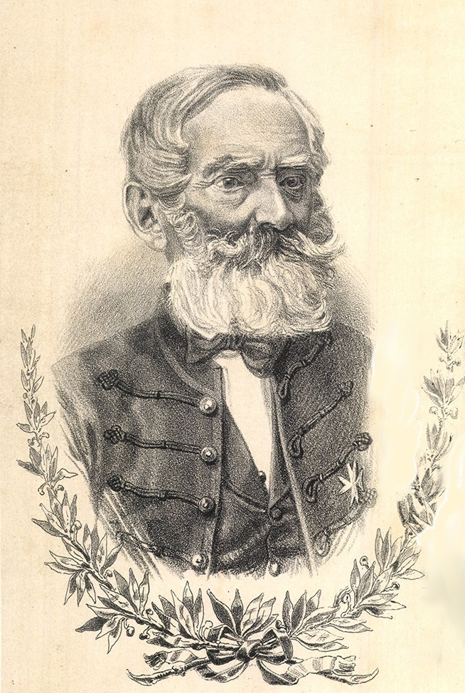 Felsőkubini és nagyolaszi Kubinyi Ágoston (Videfalva, 1799. május 30. – Tápiószentmárton, 1873. szeptember 19.) művelődésszervező, 1843–1869 között a Magyar Nemzeti Múzeum igazgatója.